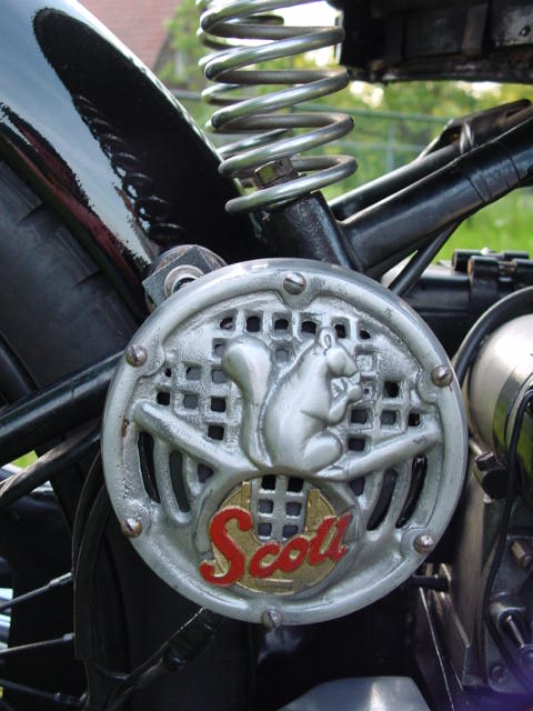 Scott 1932 Squirrel.